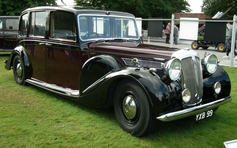 Daimler Straight-Eight Limousine Landaulette 1947